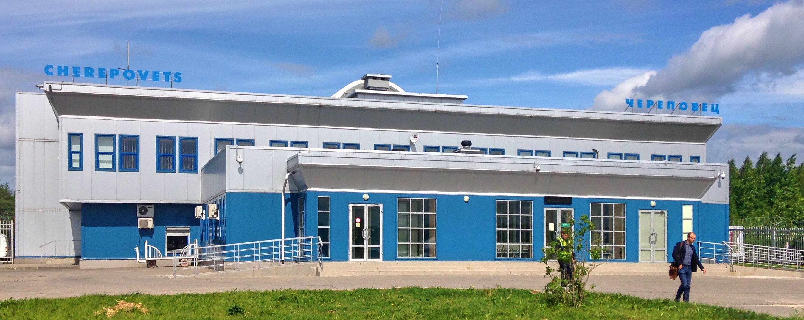 Здание аэропорта Череповца со стороны ВПП